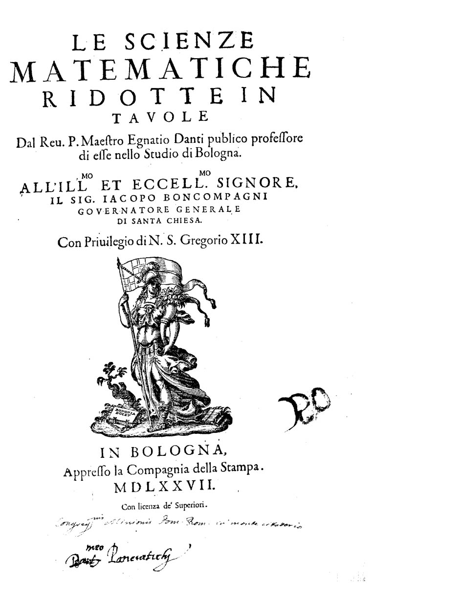 Le scienze matematiche ridotte in tauole dal reu. p. maestro Egnatio Danti publico professore di esse nello studio di Bologna. .... - In Bologna : appresso la Compagnia della Stampa, 1577. - [4], 59, [1] p. ; fol. .